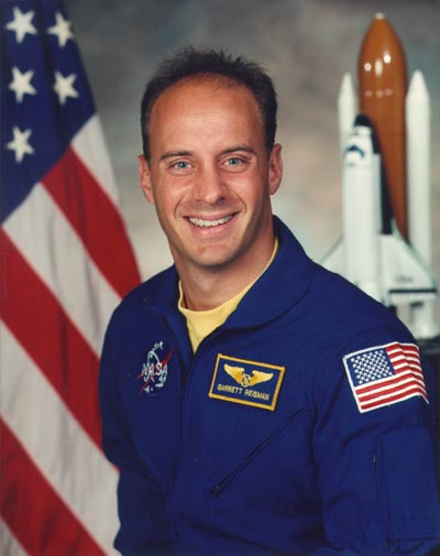 portrait astronaut Garrett Reisman